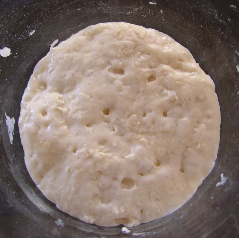 Rezept